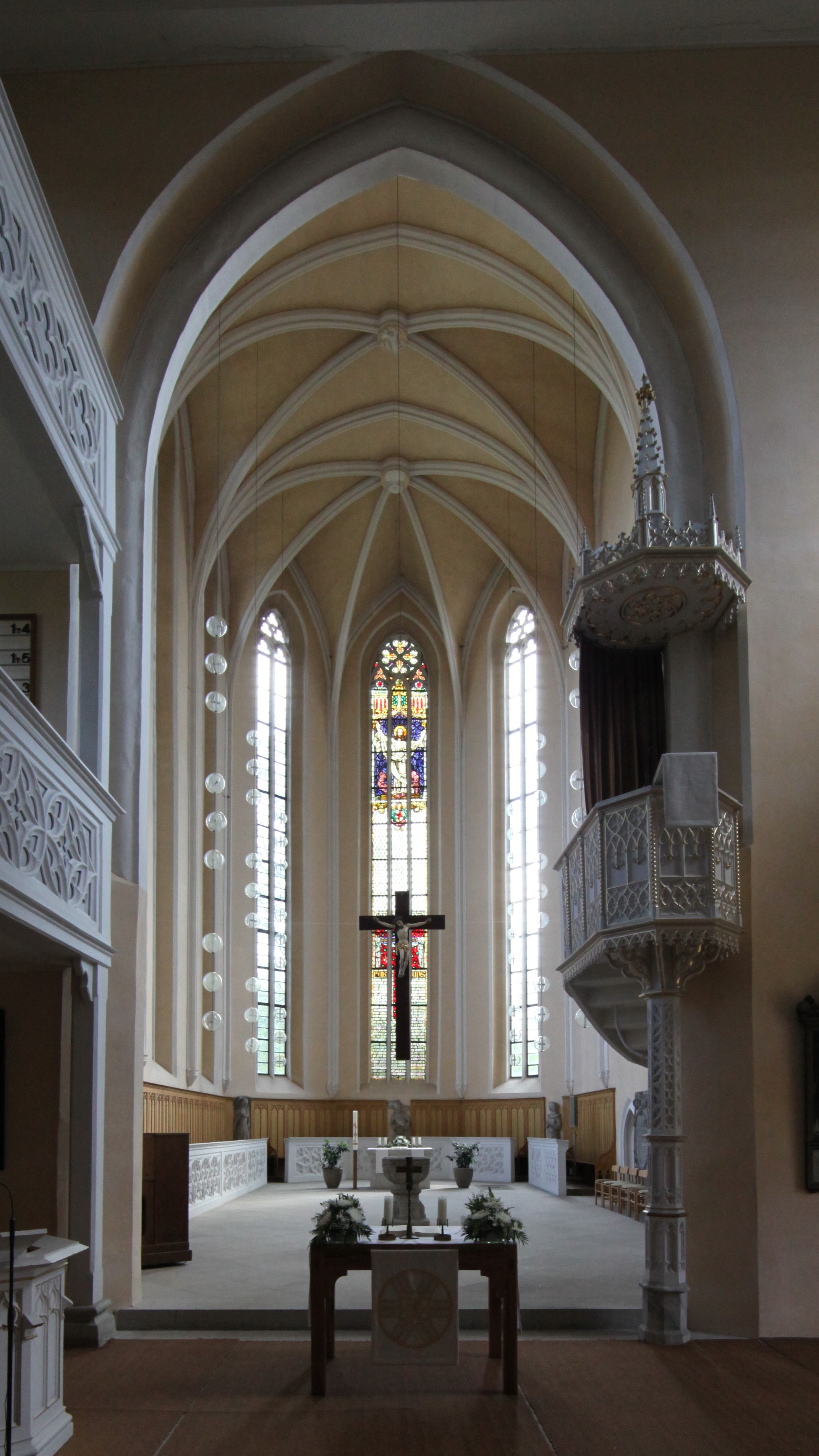 Klosterkirche in Sonnefeld, Landkreis Coburg